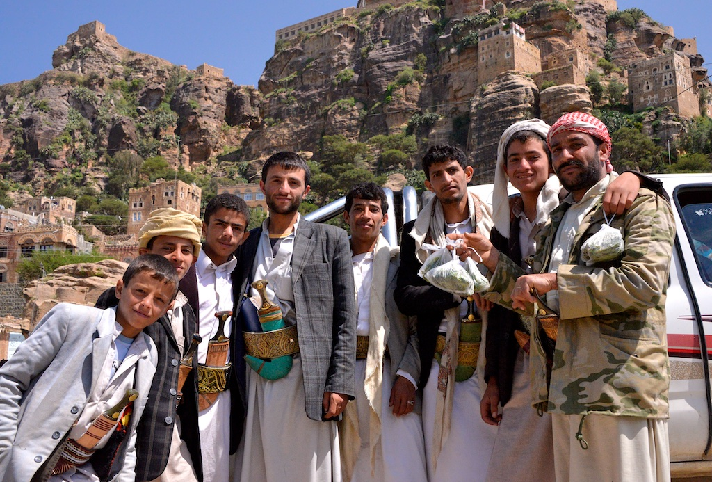 Tribesmen, Yemen